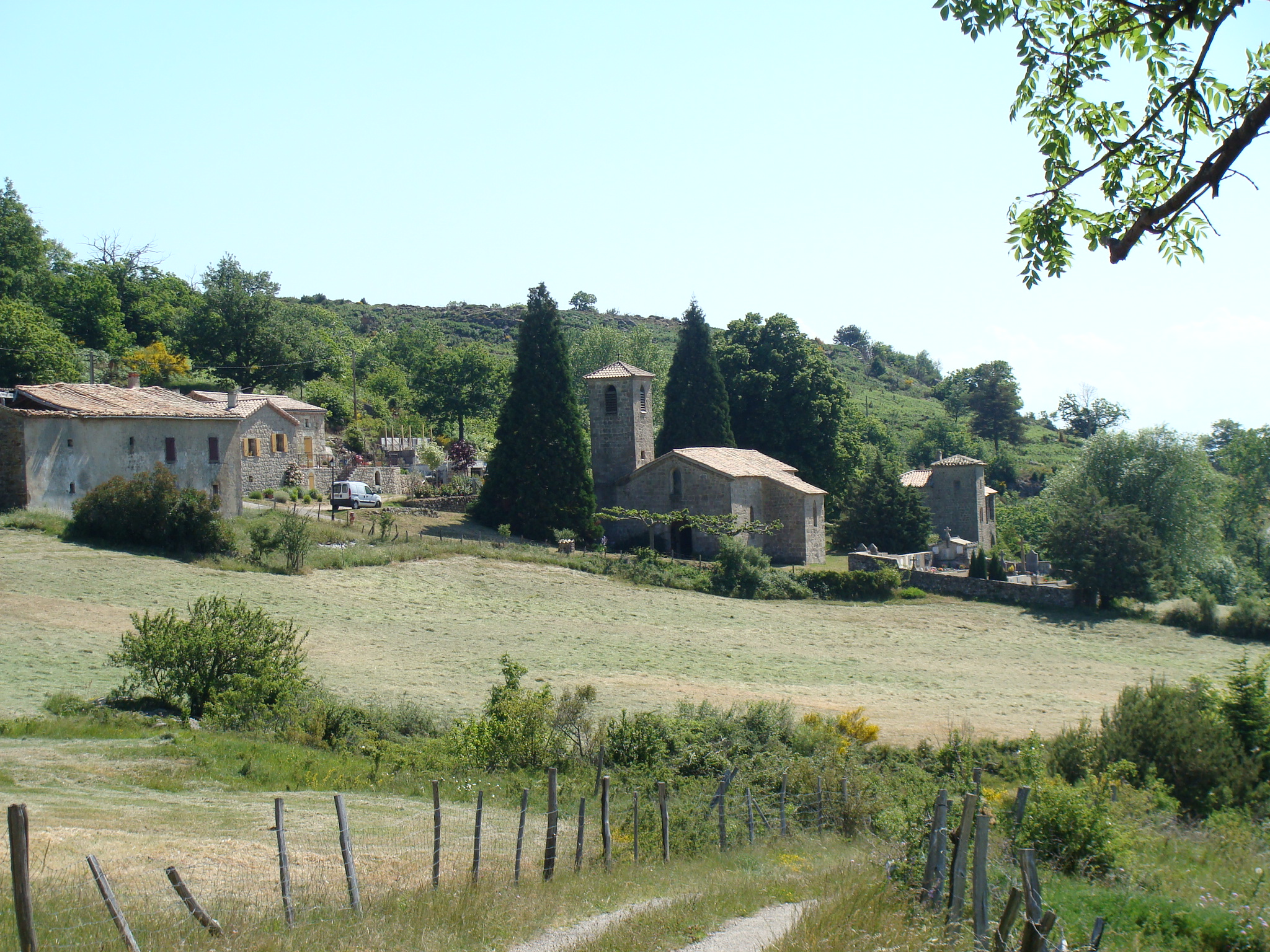 Eglise romane, origine XIe siècle, reconstruite jusqu'au XIXe siècle.